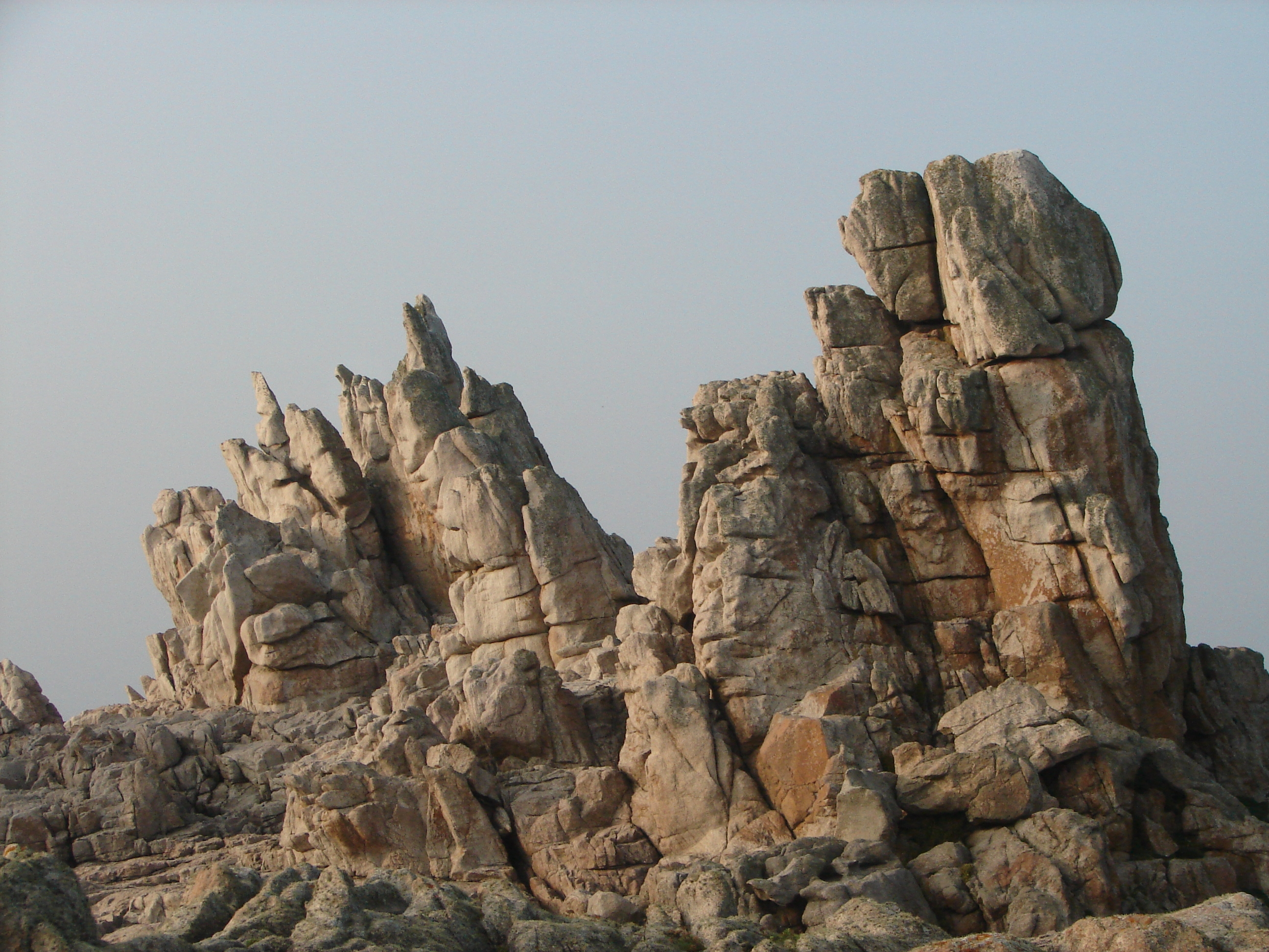 Lieu : Île d'Ouessant (Bretagne/France)